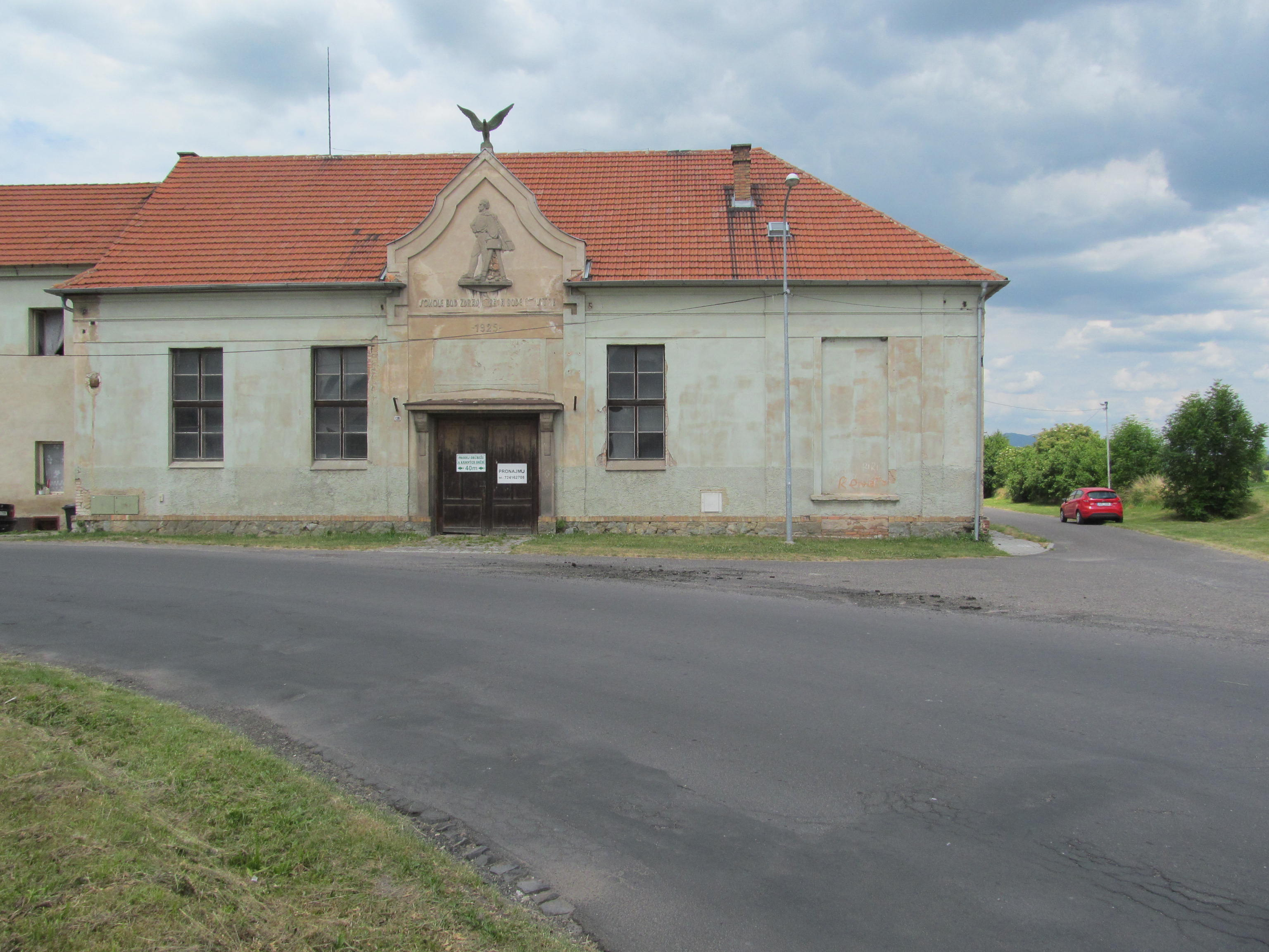 Sokolovna, Perucká 138, Veltěže